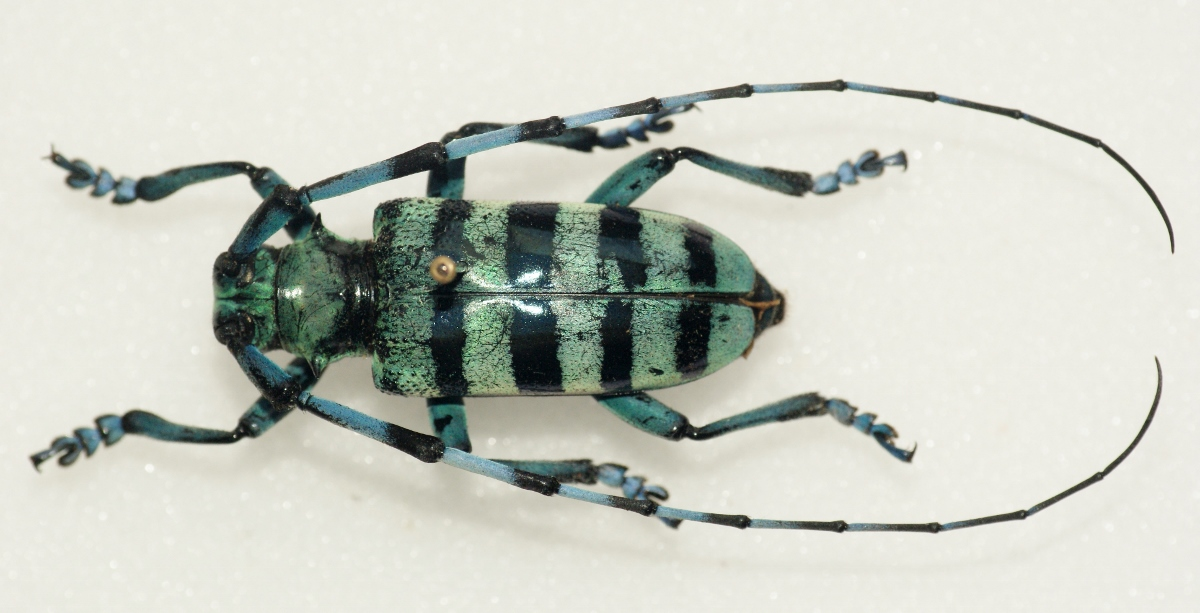 Ritsema,1881 Sex: Male Data: 04-2011 - Mt Dempo - Sumatra